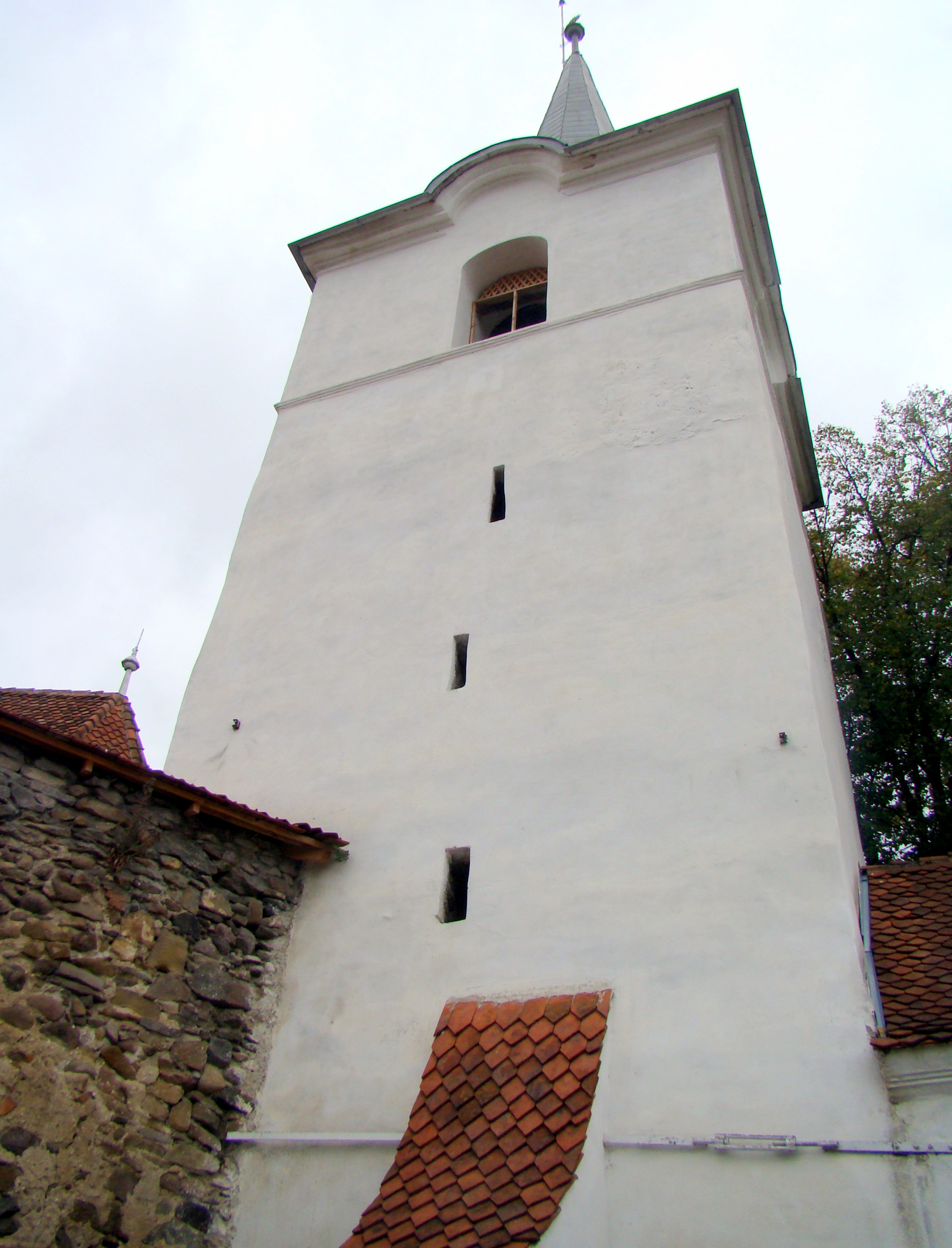 Zid de incintă cu turn de poartă, sat Ghidfalău; comuna Ghidfalău 204 A sec. XV 02